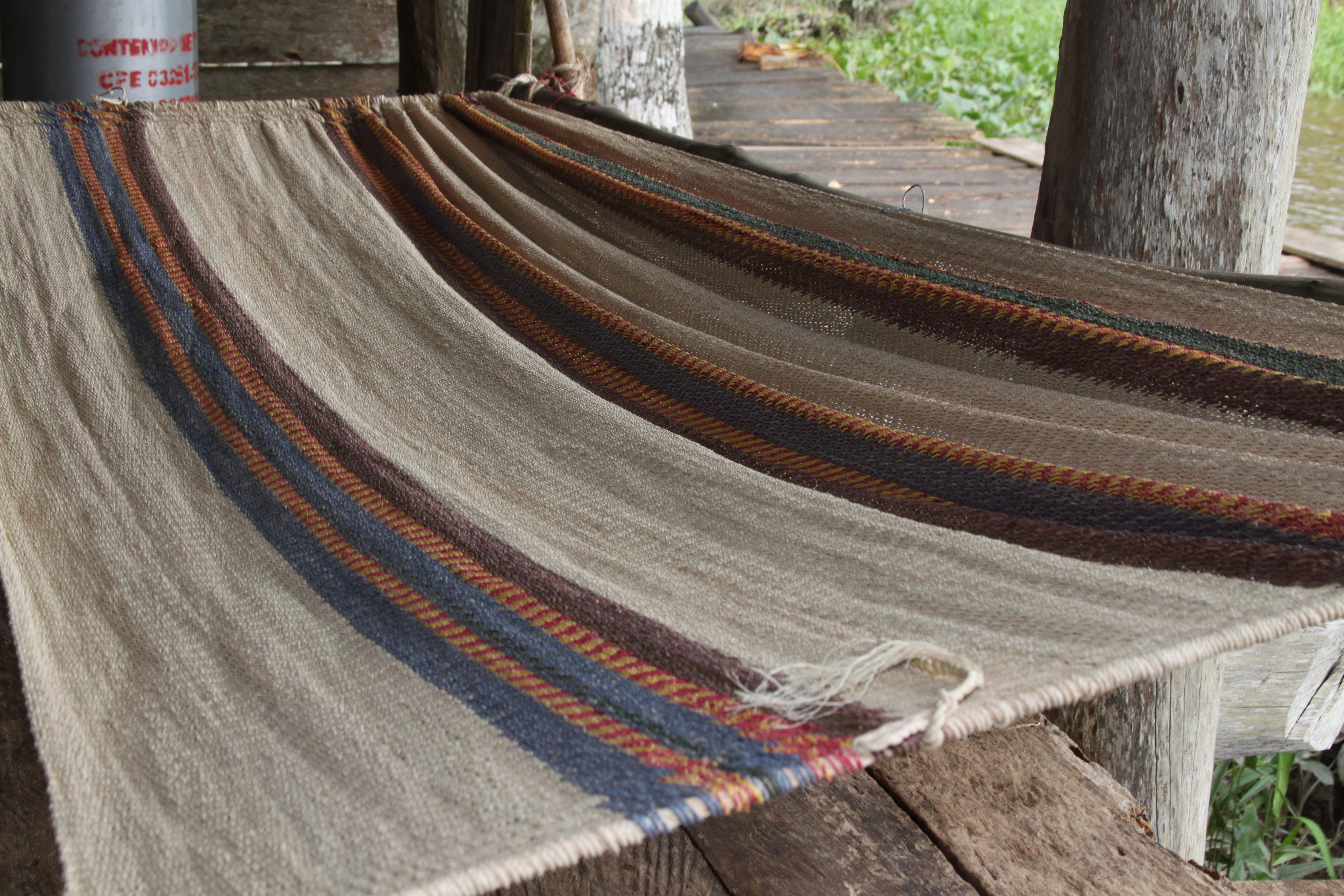 Tejido de hamaca Warao